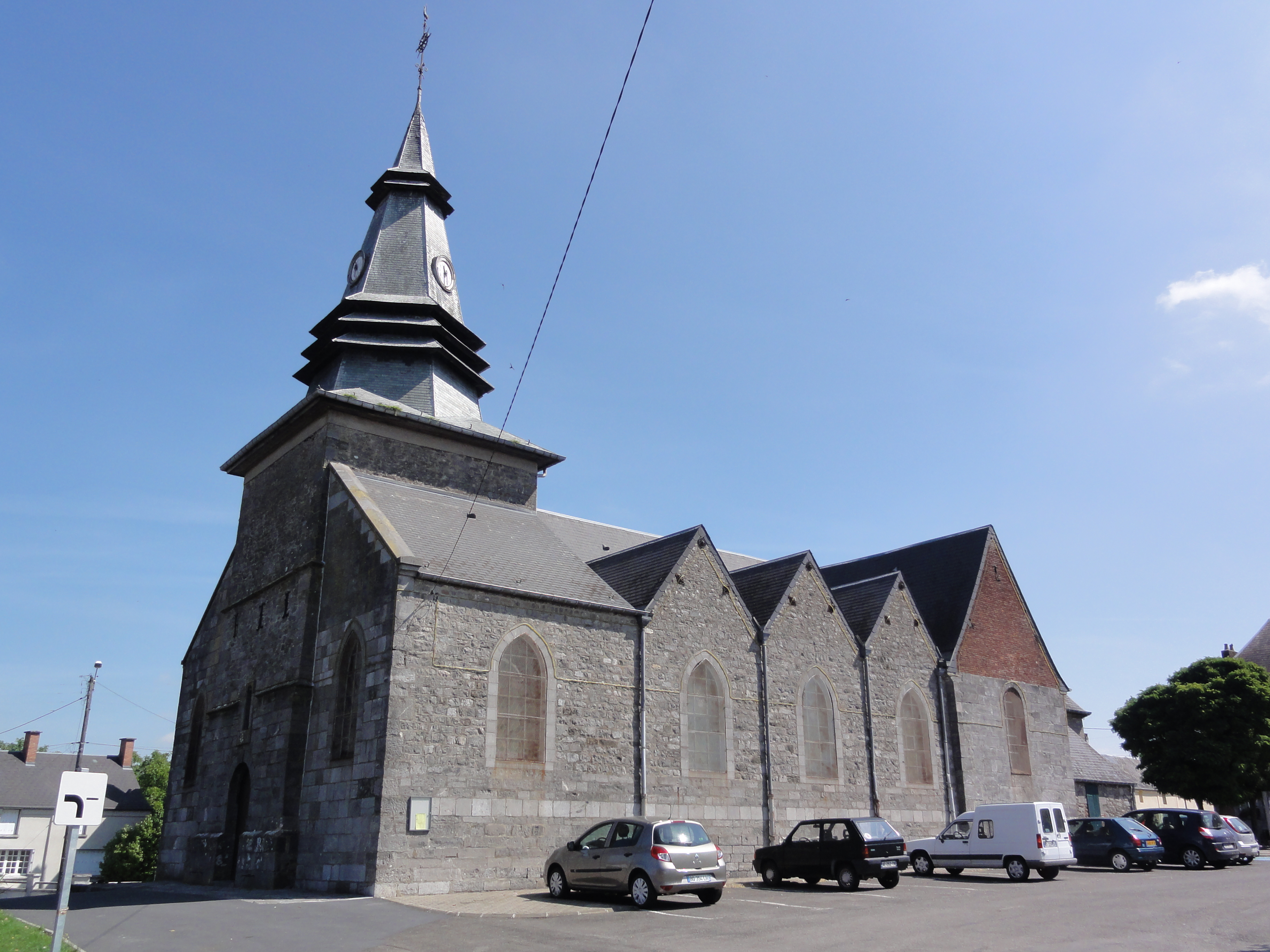 Avesnelles (Nord, Fr) église